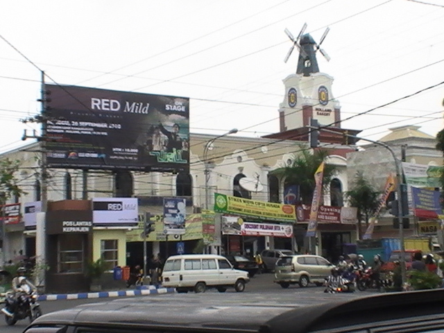 Holland Bakery, simpang Kepanjen, Malang